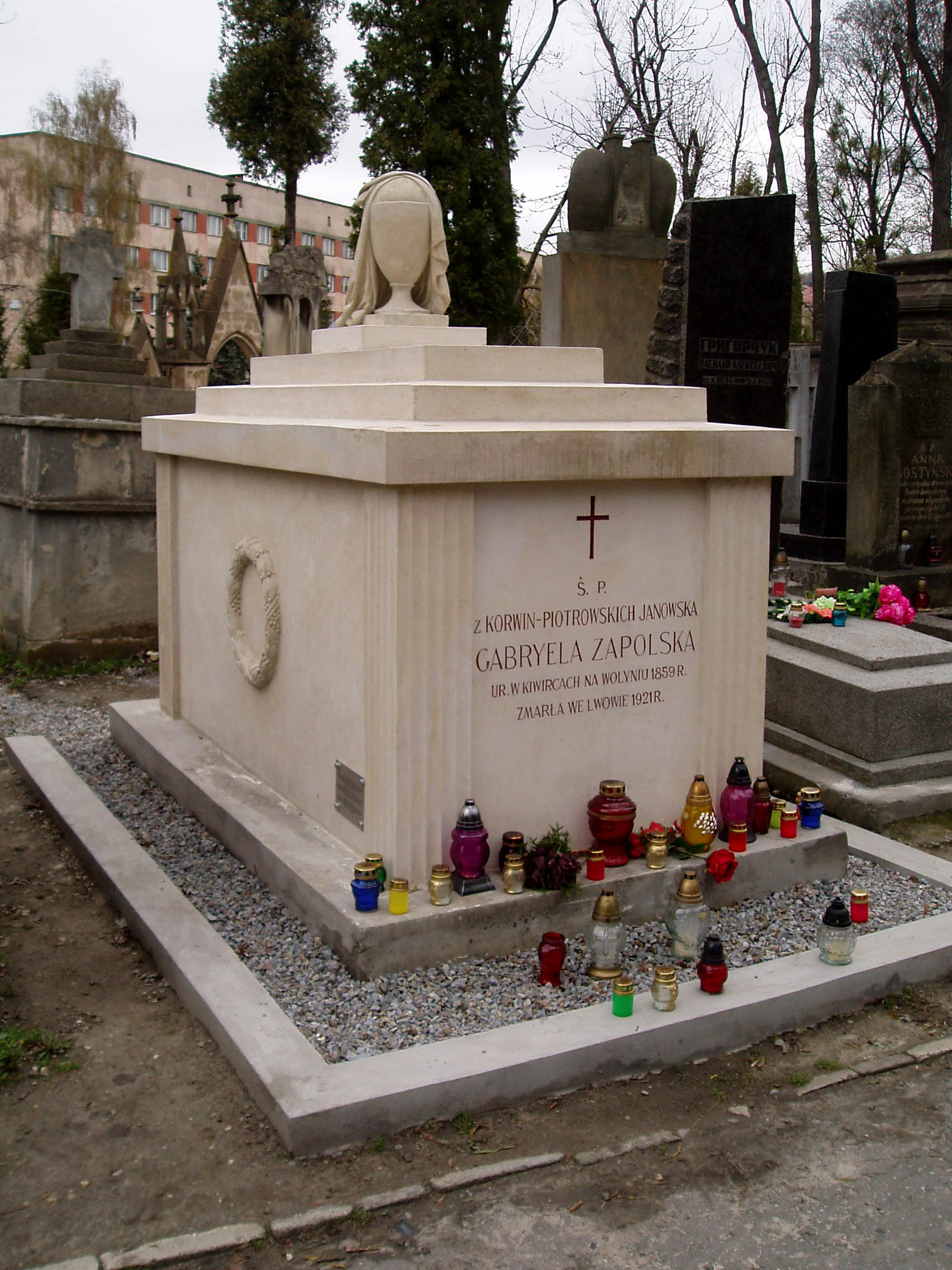 Гробівець Габріелі Запольської на Личаківському цвинтарі у Львові.